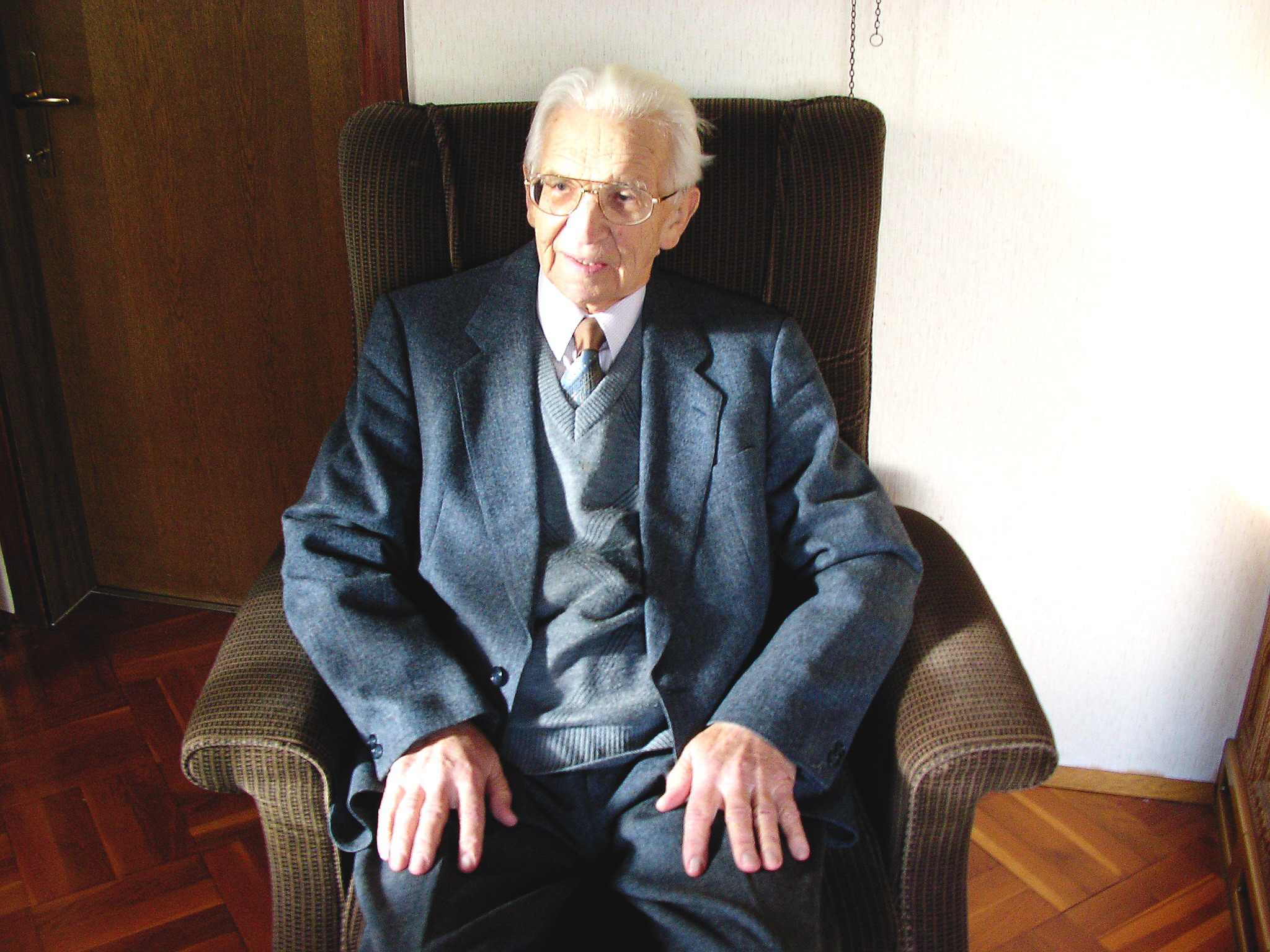 Franz Leitner 1.2.2005_2; eigene Aufnahme des Autors